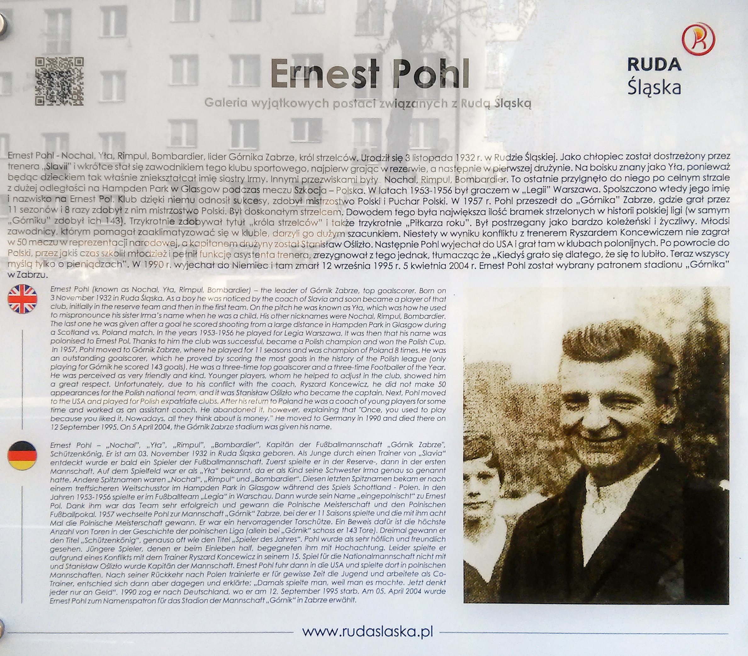 Tablica pamiątkowa Ernesta Pohla w Rudzie Śląskiej - Wirku.